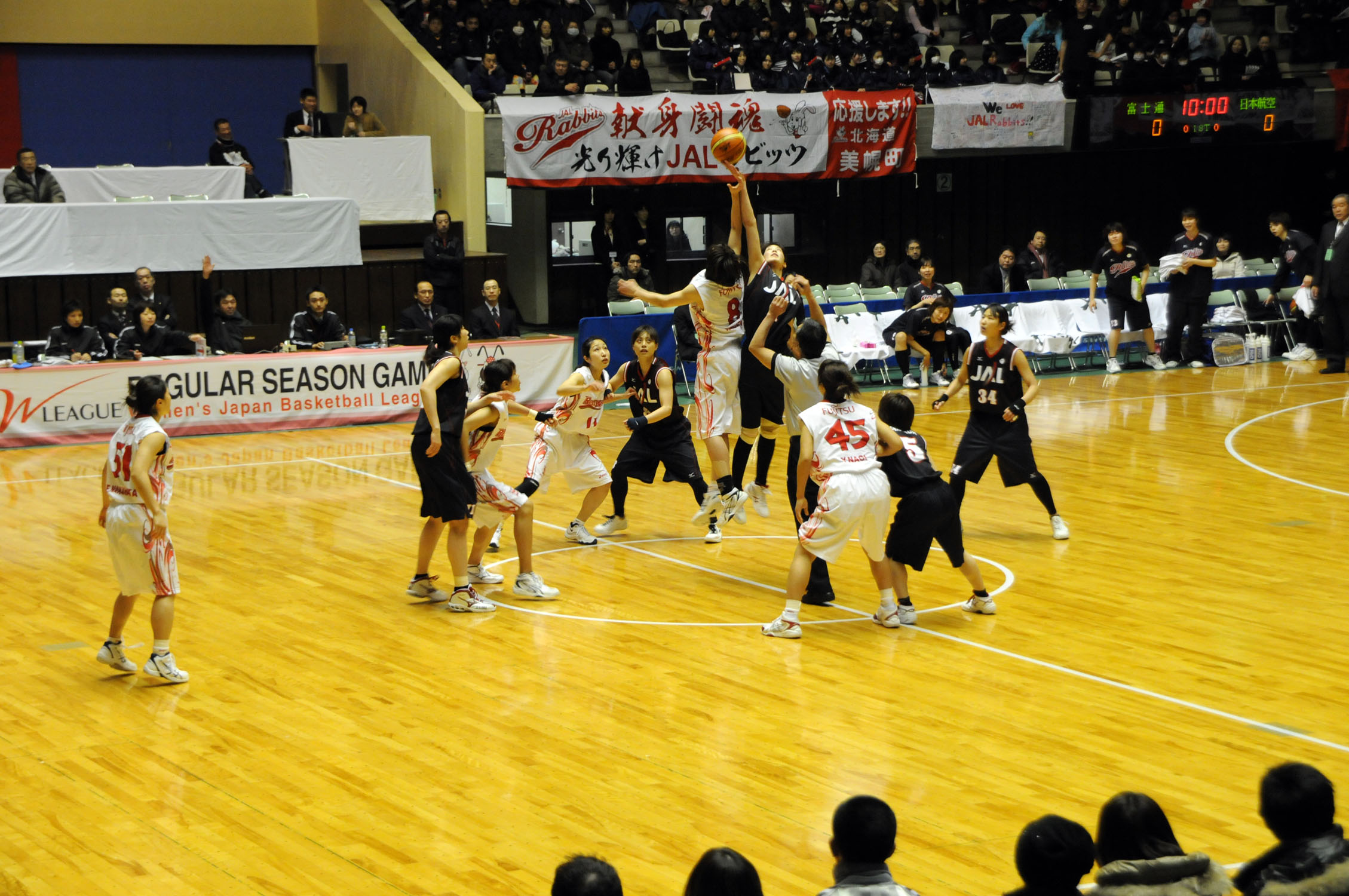 WJBL 10-11レギュラーリーグ、富士通対JAL。秋田県立体育館で。